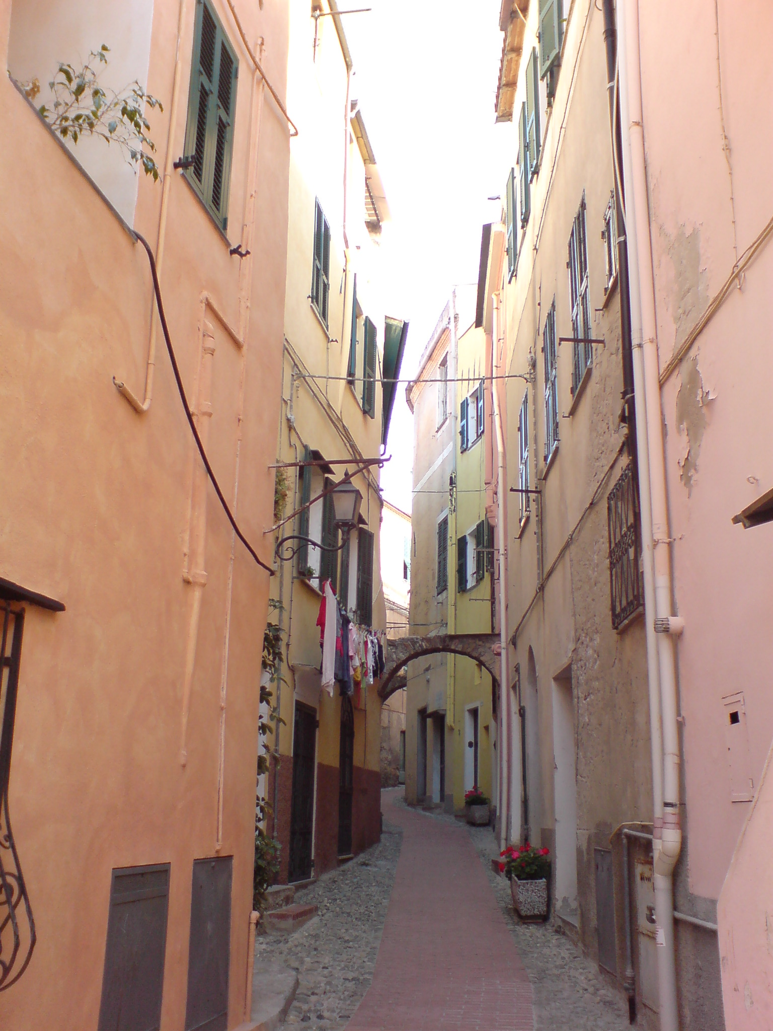 Santo Stefano al Mare (IM) Caruggio